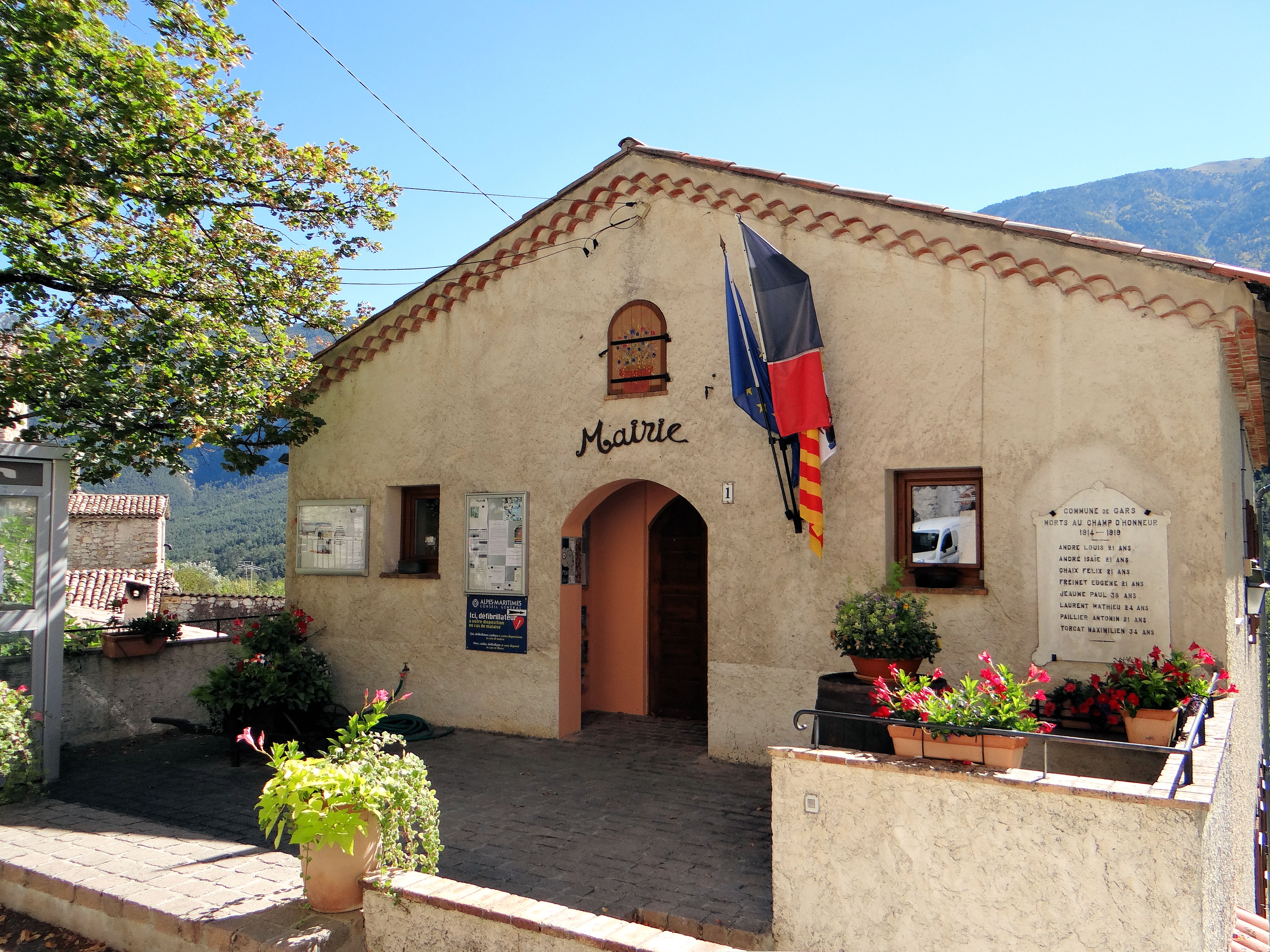 Gars - Mairie